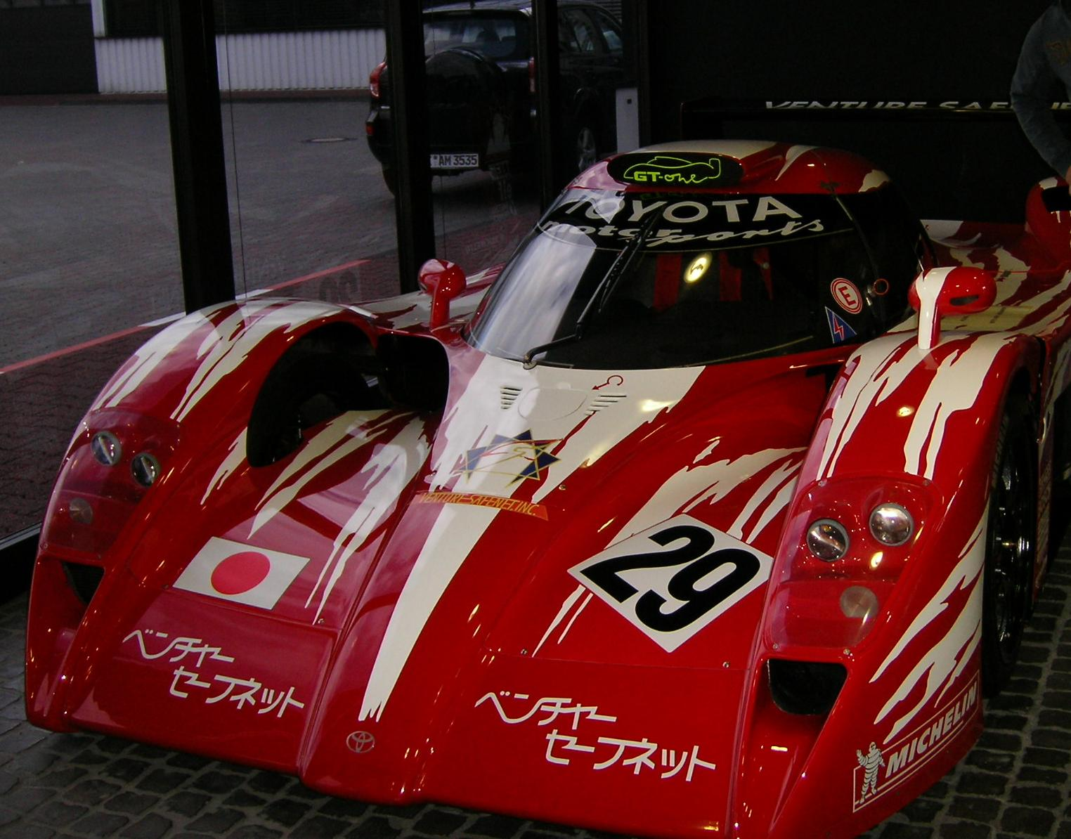 Toyota GT-ONE Front